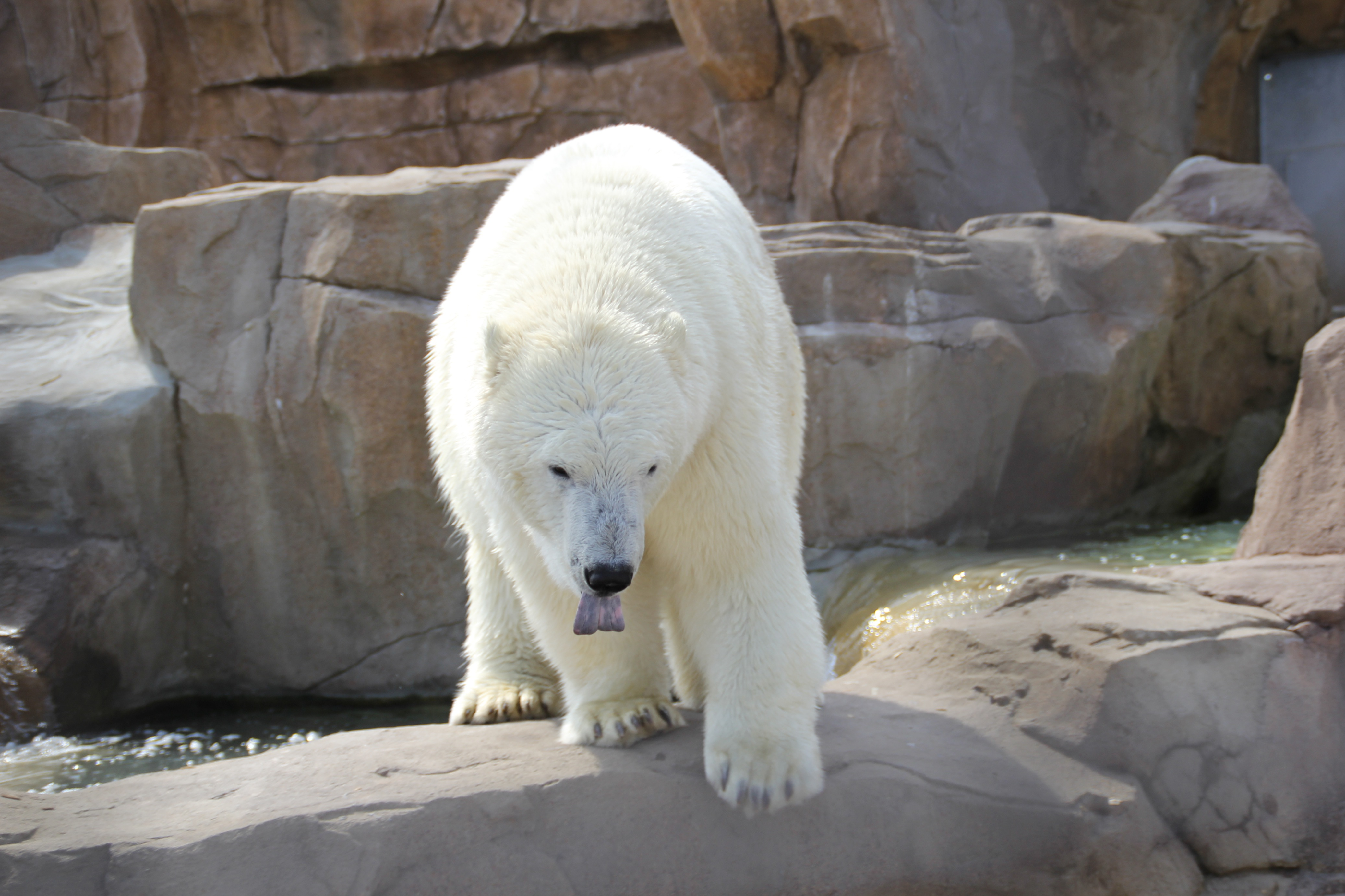 Ours polaire à Antibes